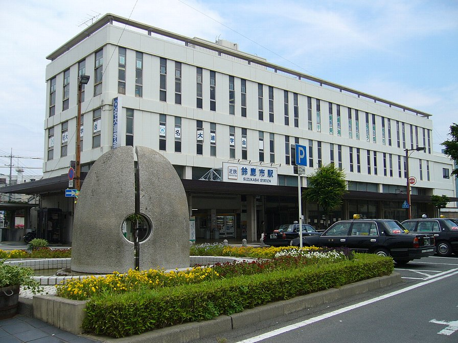 近鉄･鈴鹿市駅